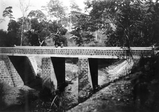 Oubangui-Chari : route Bangui-Batangafo, km 29 Guéringou